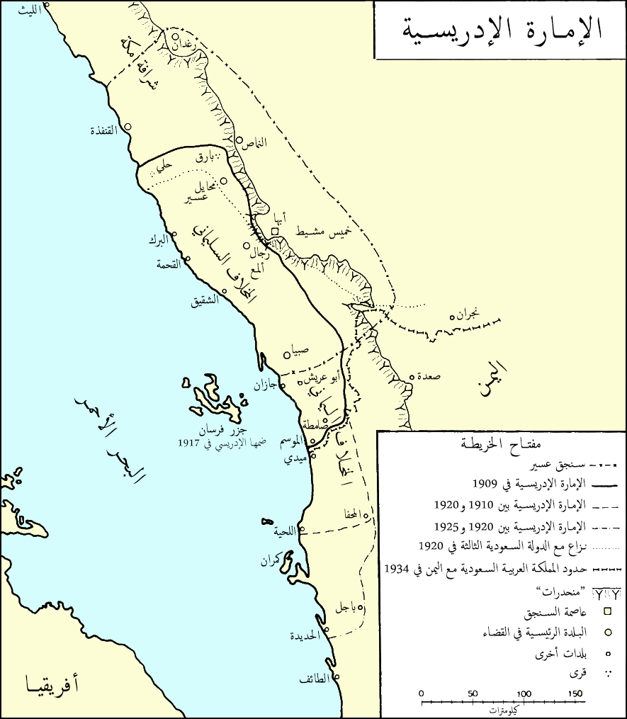 خريطة تُوضِّح حُدود الإمارة الإدريسيَّة.